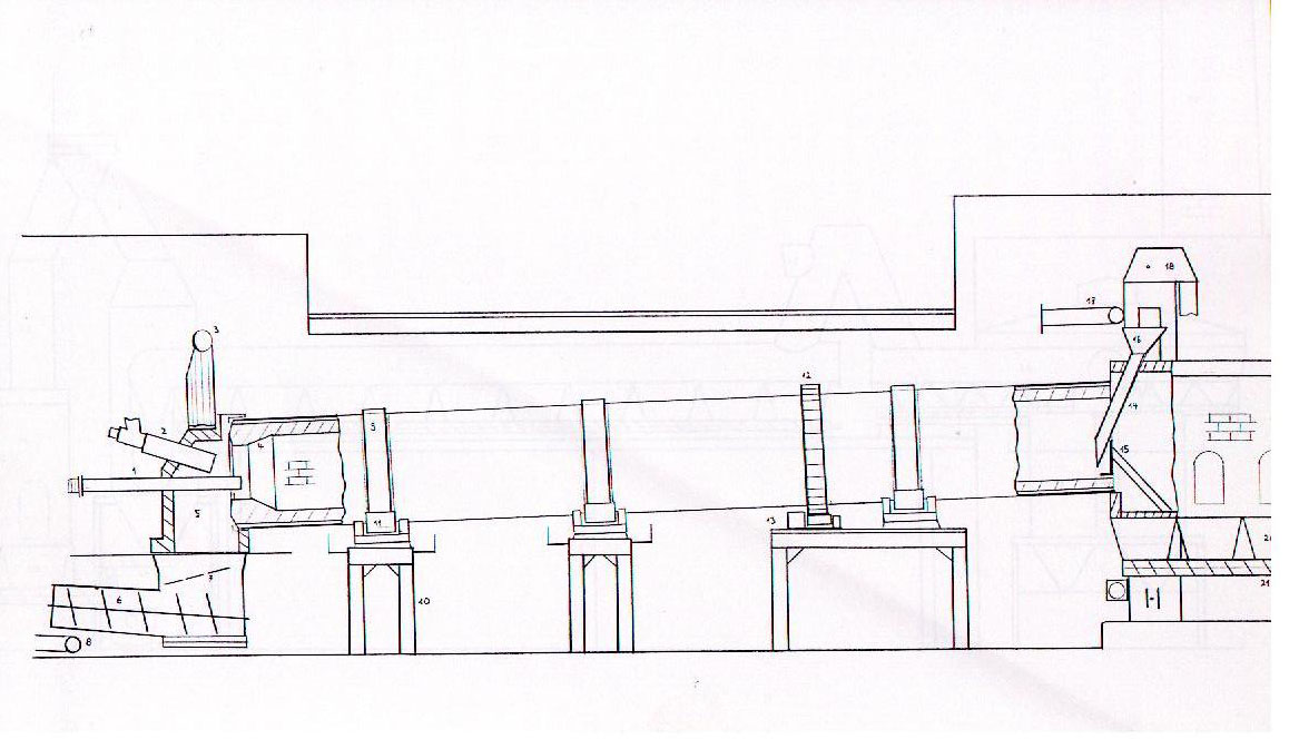 Prinzipskizze Wälzofen/ Drehrohofen